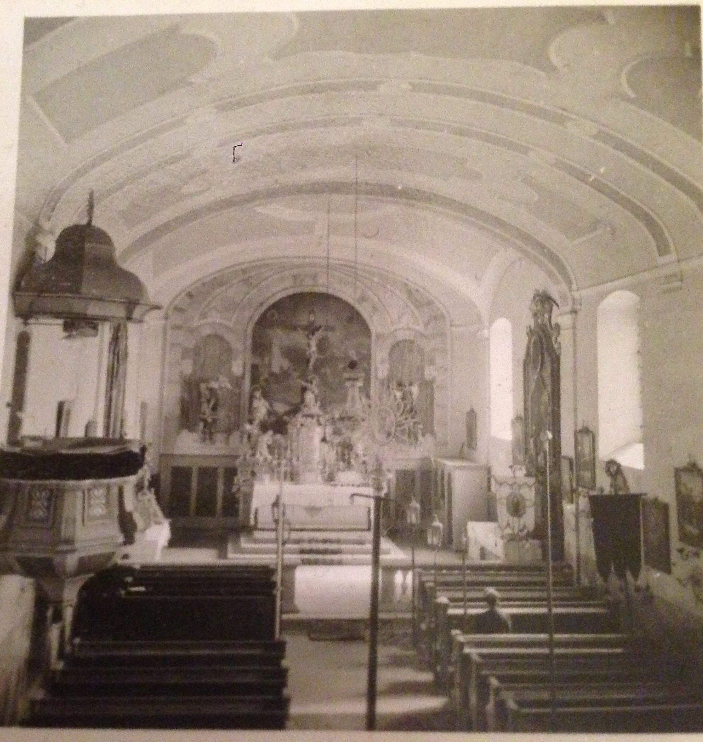 Pfarrkirche Hall bei Admont (Austria), Inneres um 1950